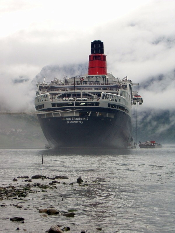 Die QE2 im Geirangerfjord in Norwegen.